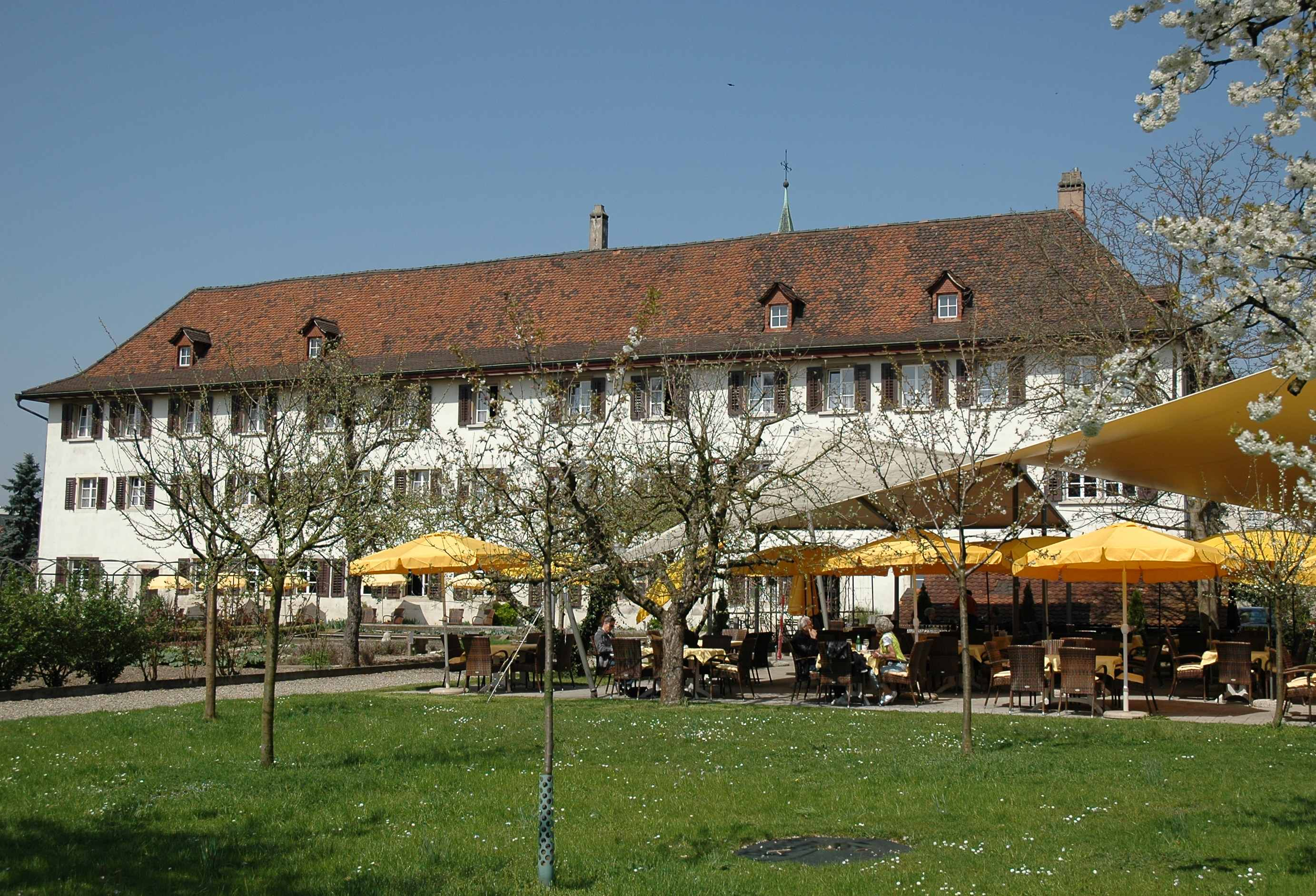 Klosteret i Dornach ligger rett ved togstasjonen Dornach-Arlesheim.